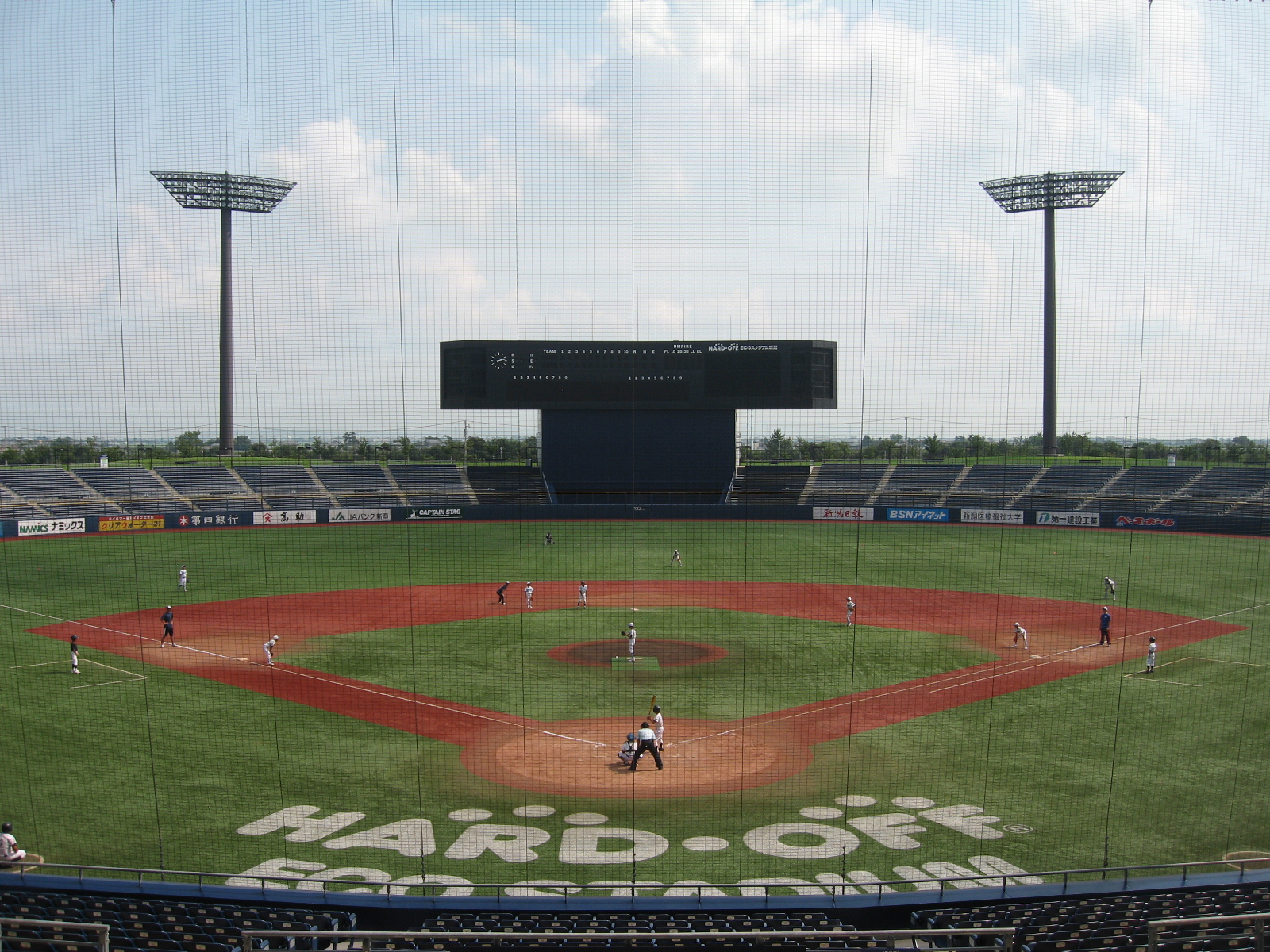 新潟県立野球場のグラウンド。